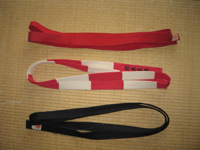 Dan obi in judo